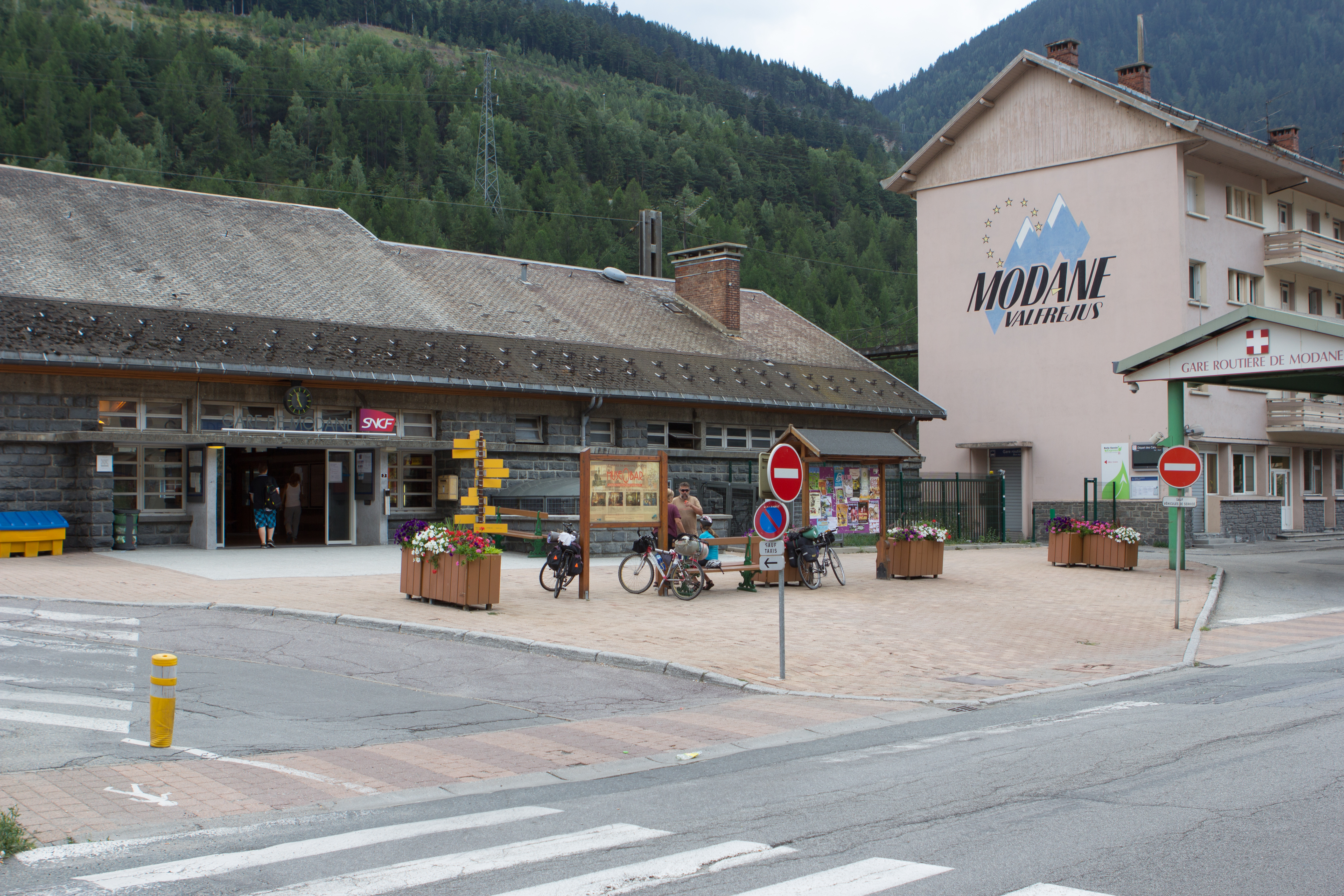 Gare de Modane, Modane, Savoie, France